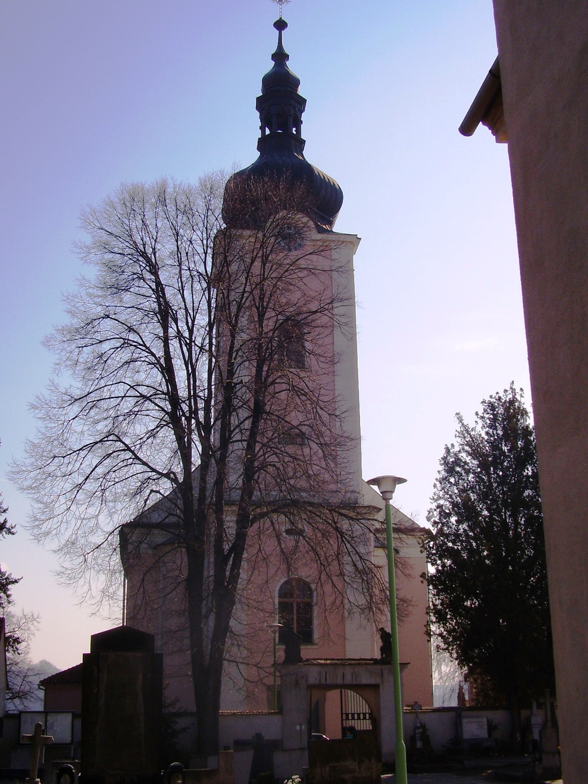 Kostel sv. Mikuláše (Oslavany), Oslavany